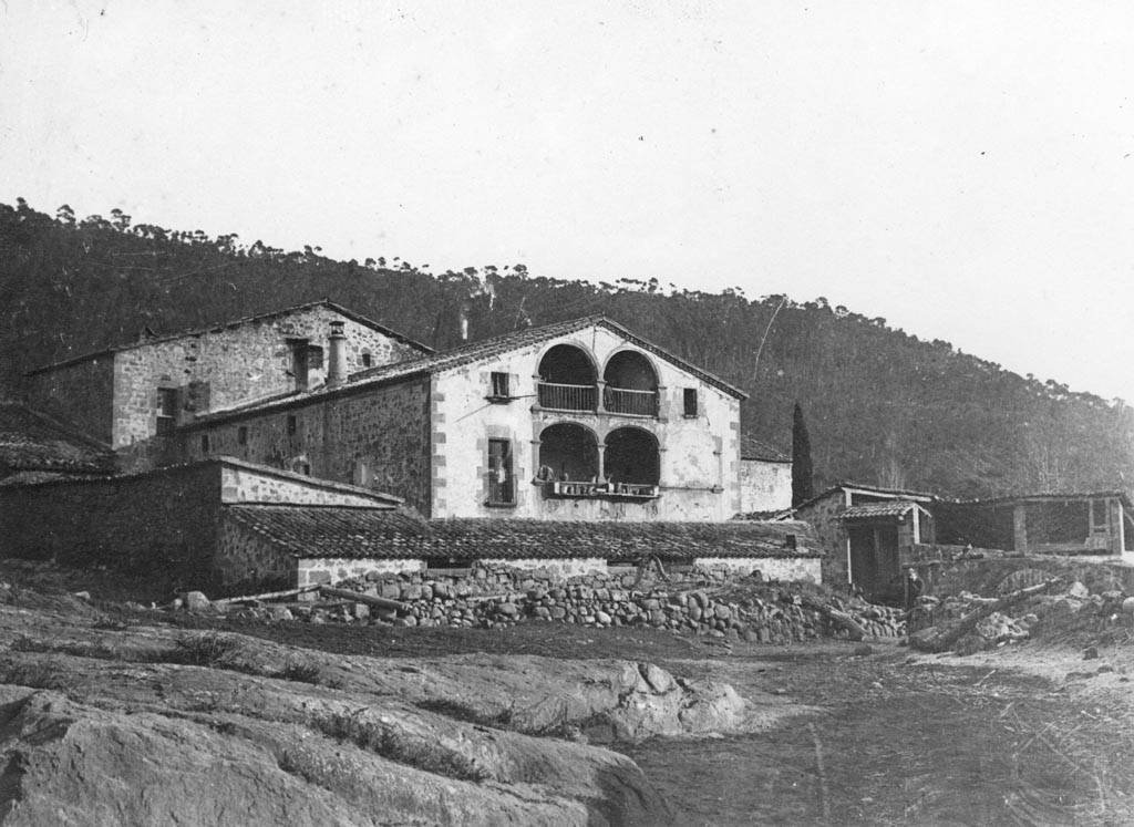 Vista general de Mas Navel de Serrateix. Cèsar August Torras i Ferreri (Entre 1890 i 1923)